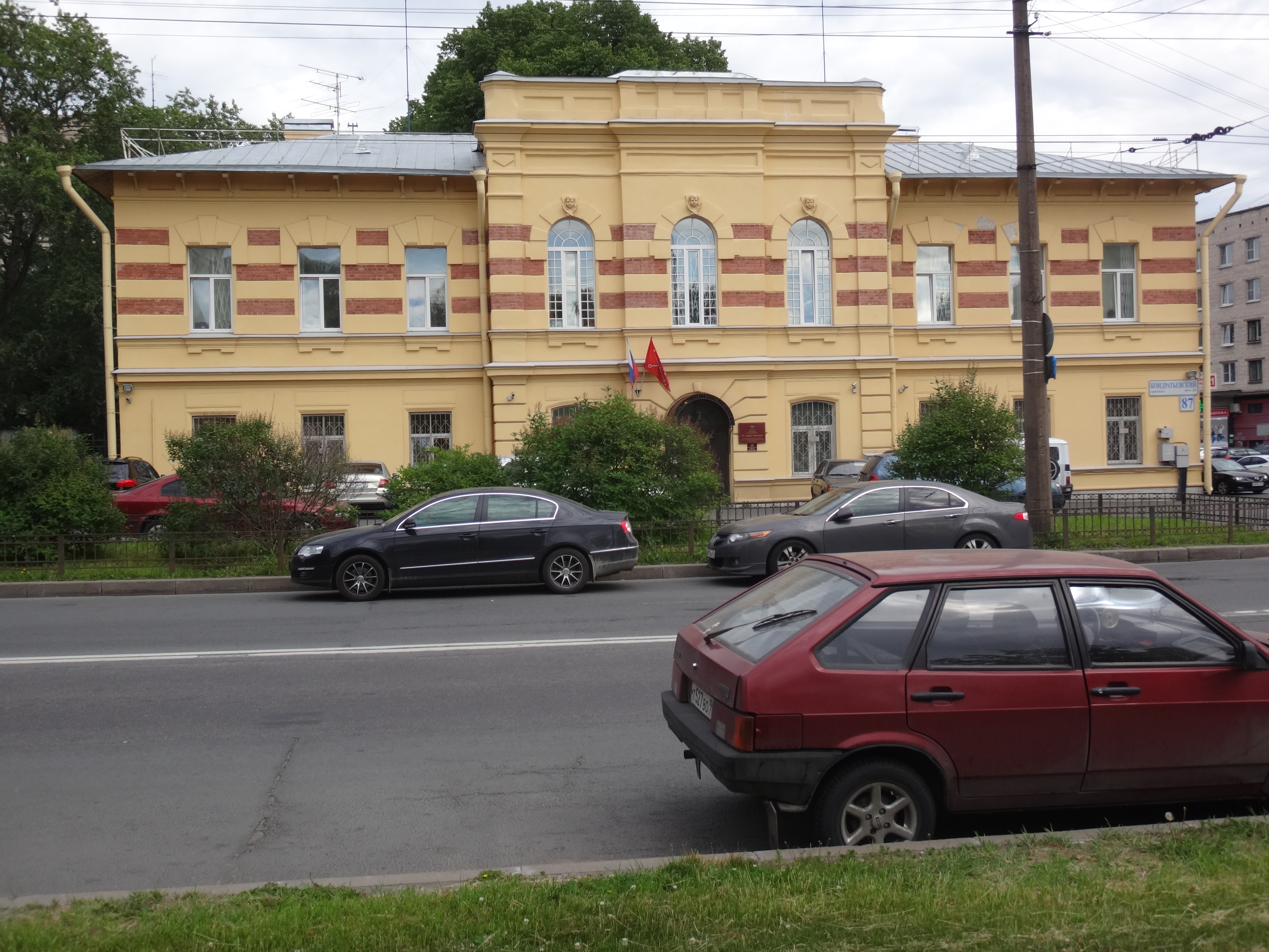 Санкт-Петербург, Кондратьевский проспект, дом № 87. Здание бывшей богадельни Общества вспоможения приказчикам и сидельцам, построено в 1901 году по проекту инженера Н. В. Никитина